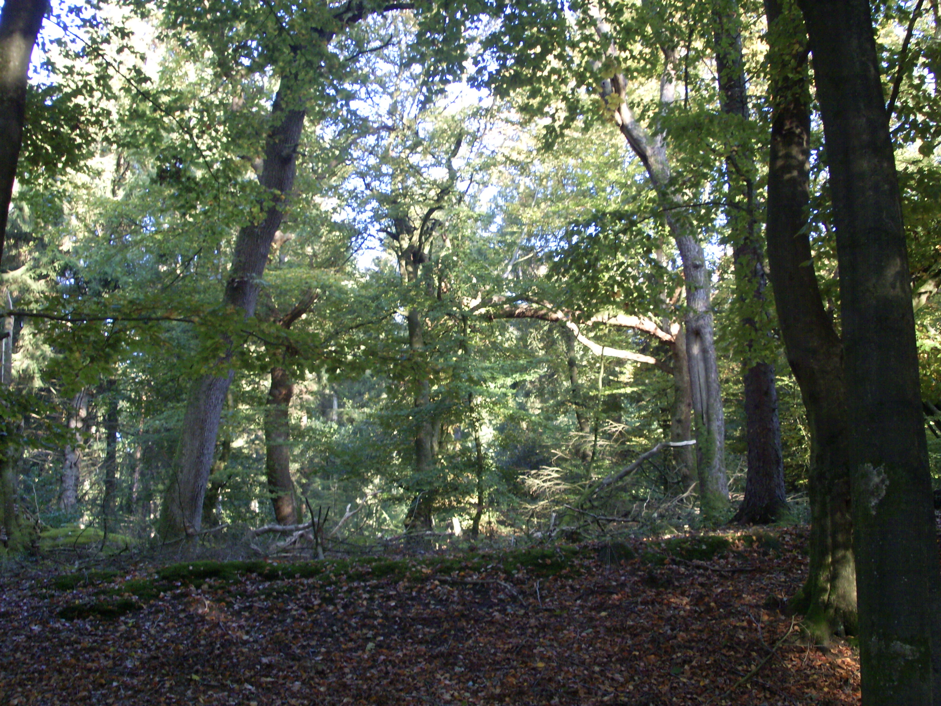 Aufnahme aus dem Handewitter Wald